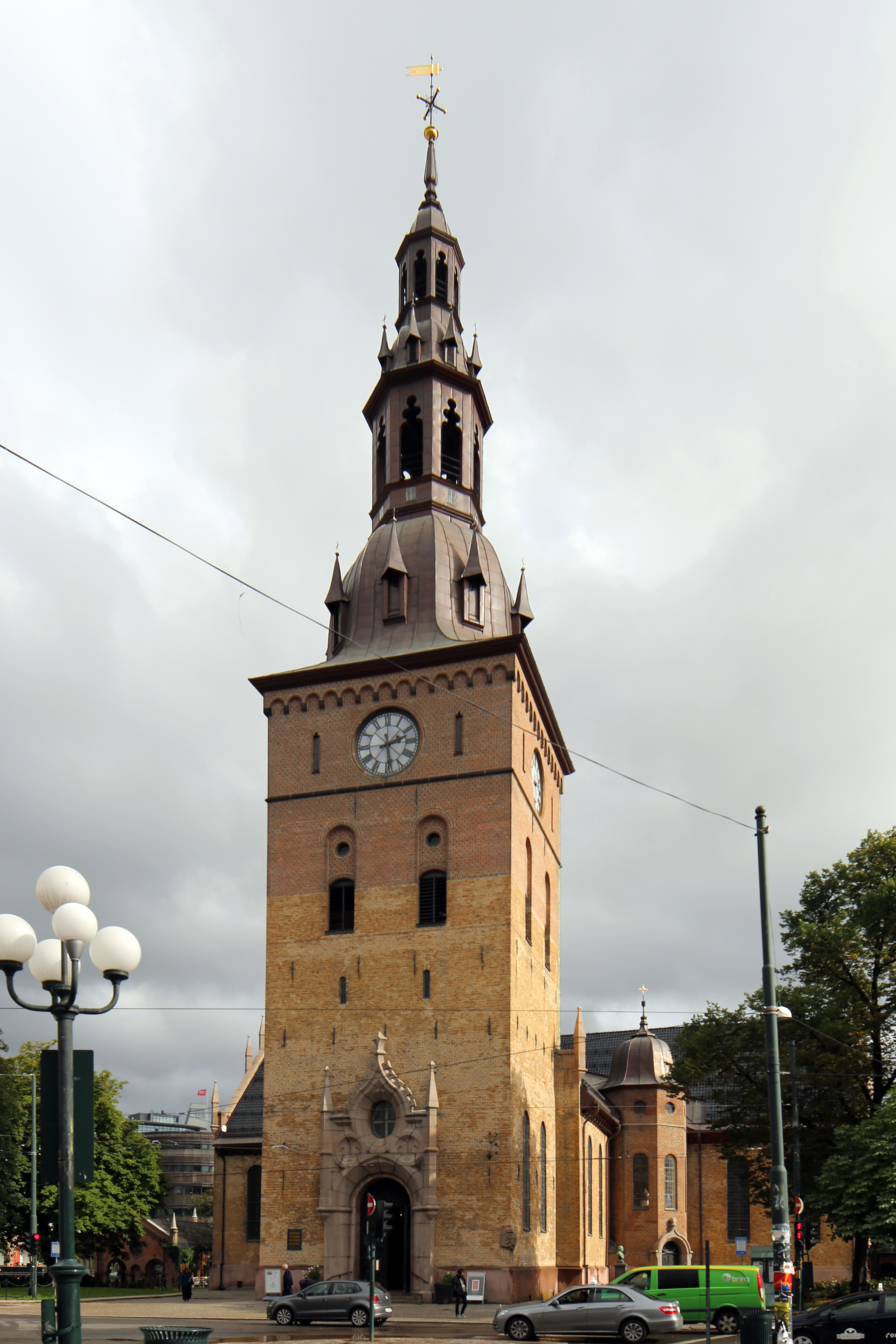 Oslo domkirke